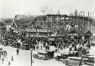 Sunnyside rides in 1923